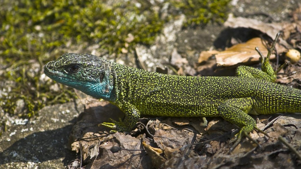 Oestliche Smaragdeidechse (Lacerta viridis)